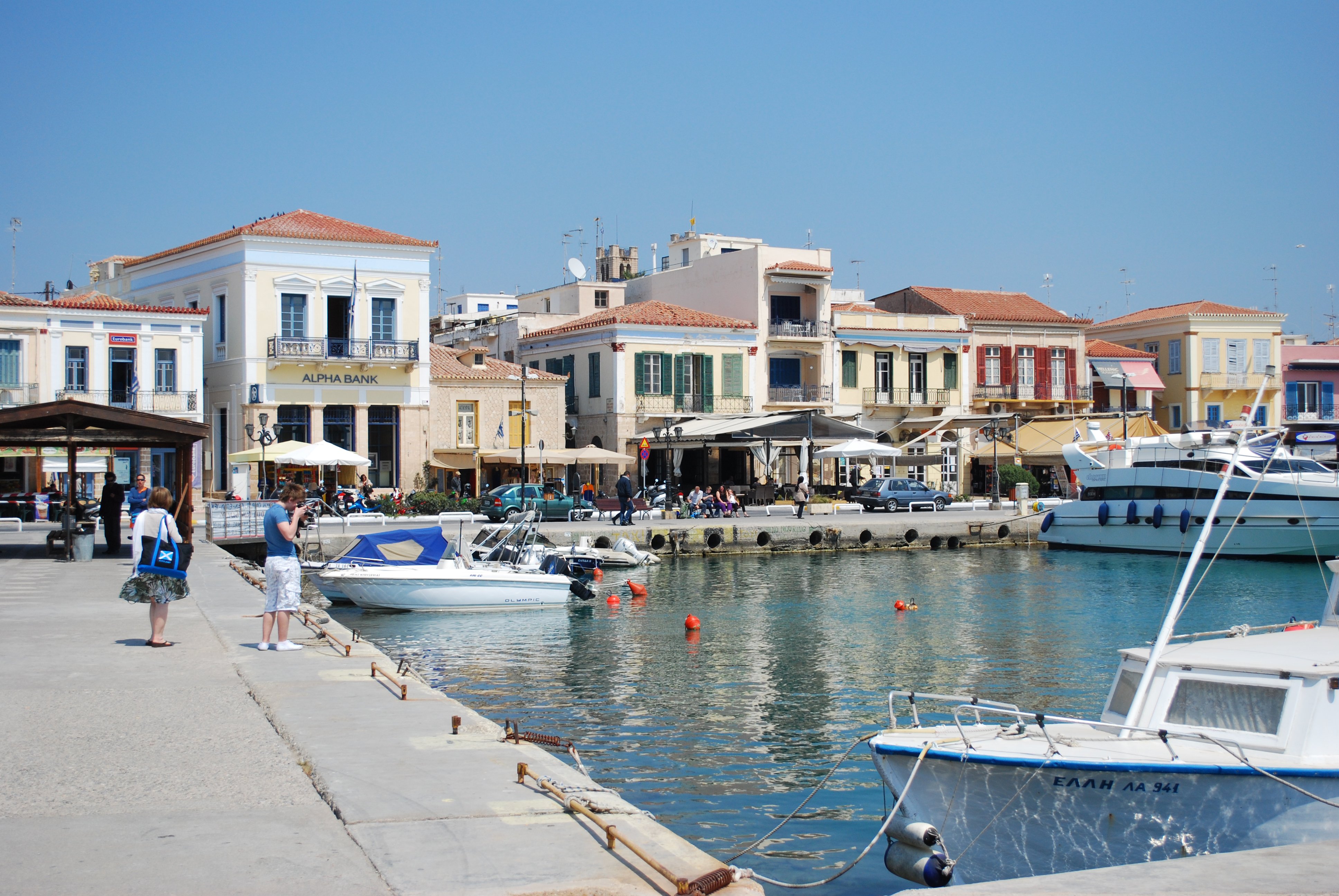 Vue du port d'Egine.